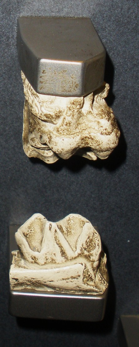 Fossil of Megahippus, an extinct mammal-- Took the photo at Natural History Museum, London